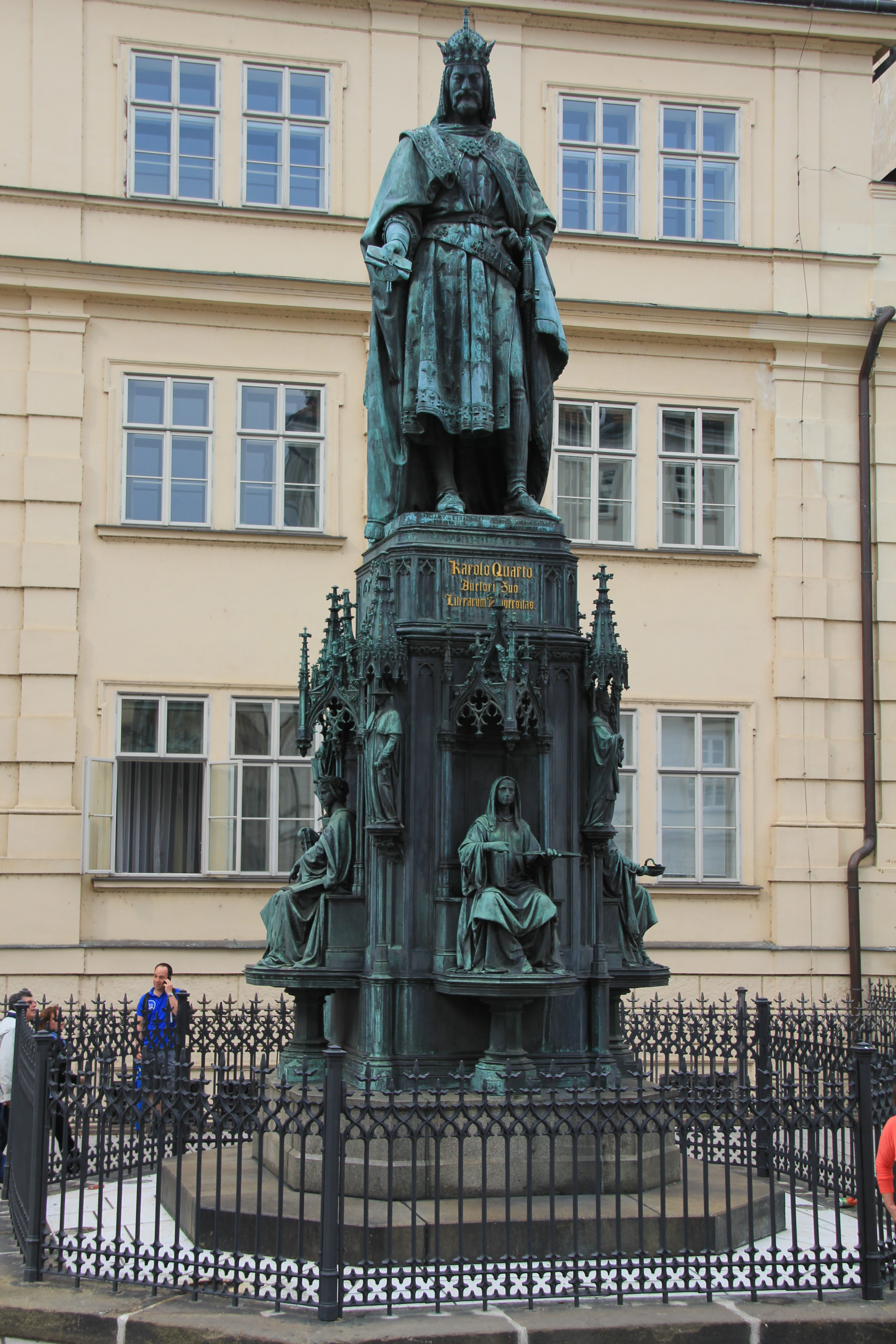 Karl IV ved Korsridderplassen